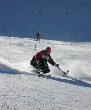 vass ági